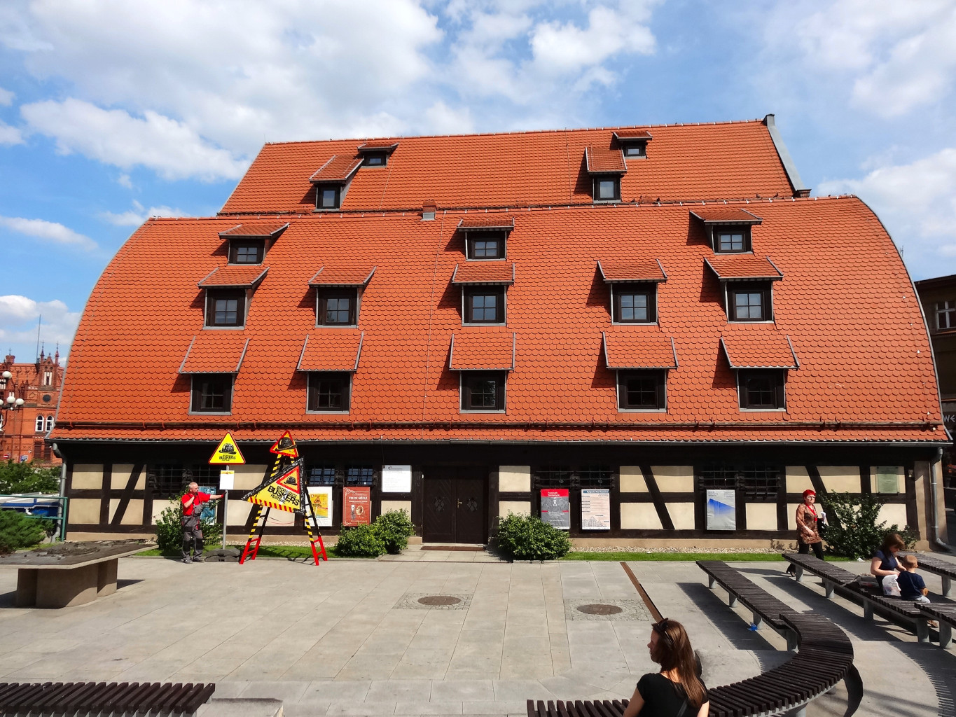 Spichrze nad Brdą w Bydgoszczy, zbud. w latach 1793-1800, od 1964 r. w gestii Muzeum Okręgowego